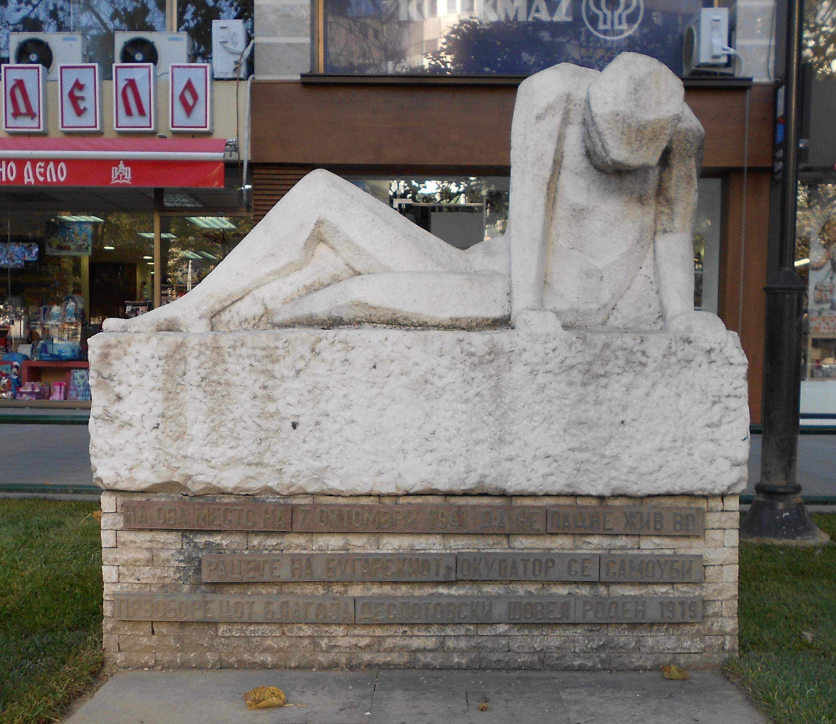 Споменик во Скопје на местото каде што се самоуби Благоја Деспотовски - Шовељ